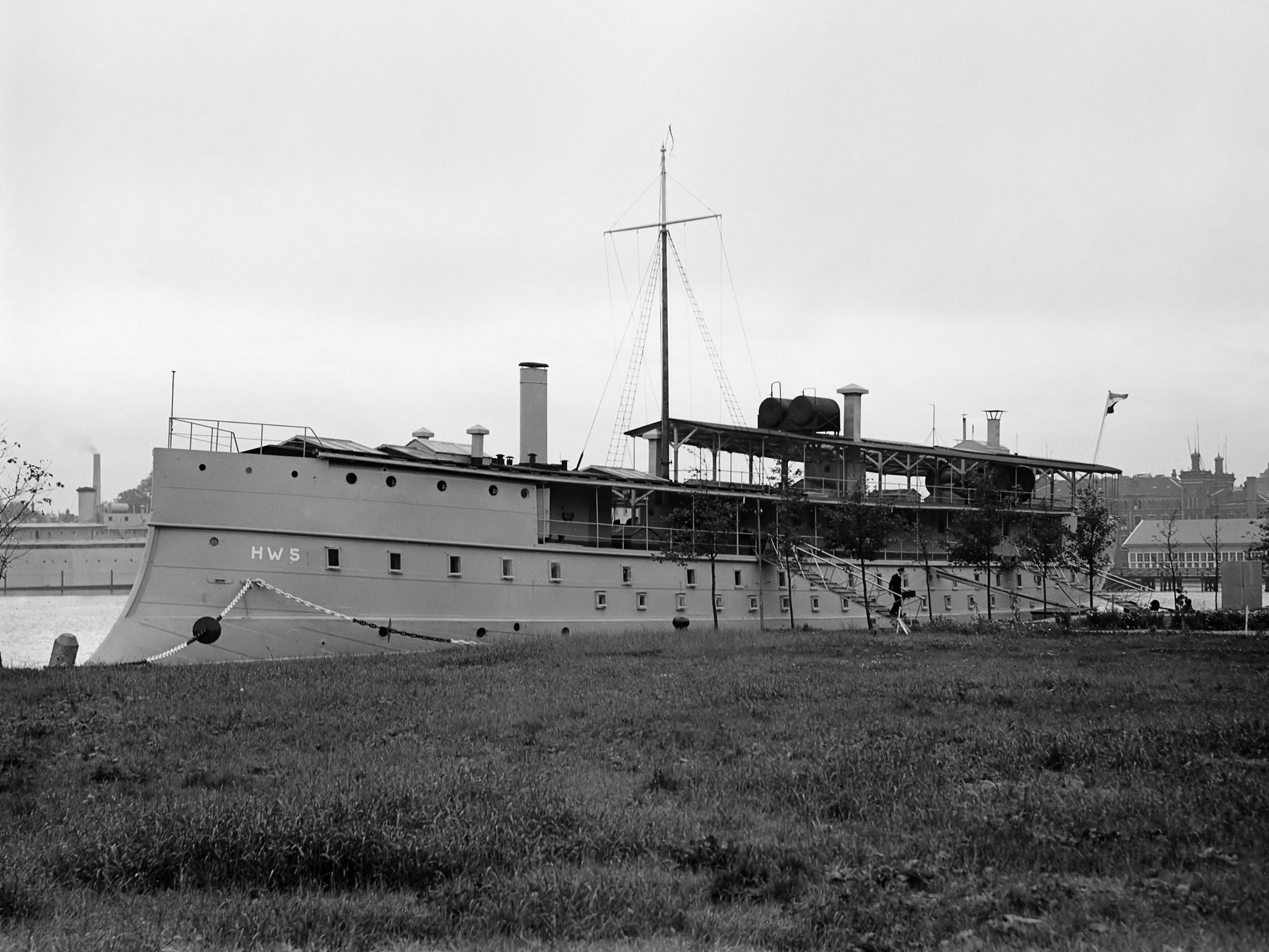 t Wachtschip "Schorpioen" (HW-5) 11 oktober 1948